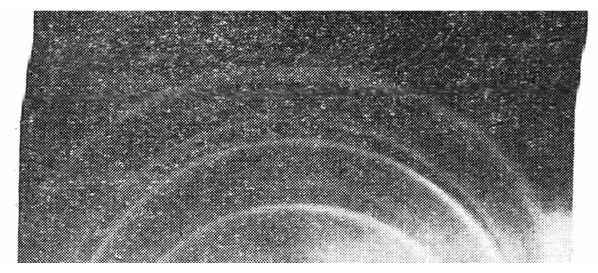 Klisza fotograficzna z zarejestrowanym przez J.K. Danysza widmem promieniowania beta, emitowanego przez rad (1911)